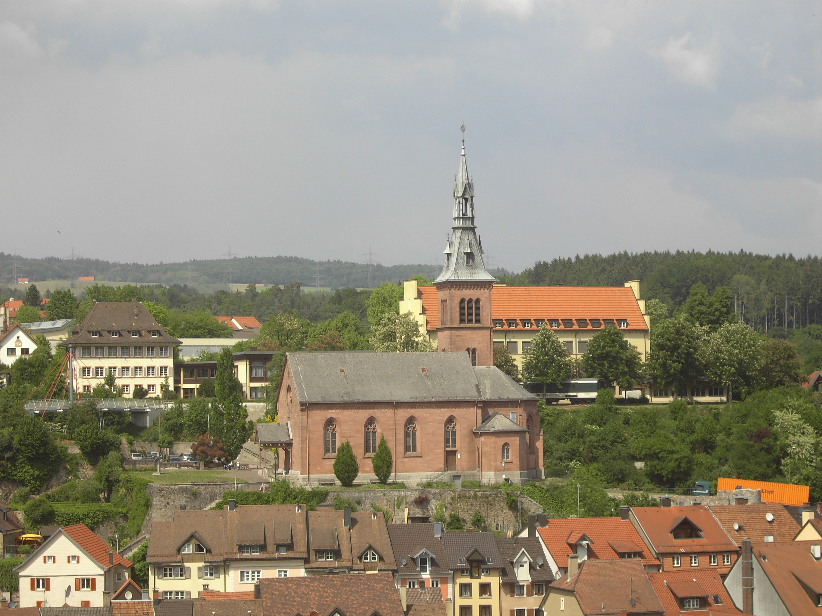 Rom.-cath. Church in Laufenburg (Baden), Germany